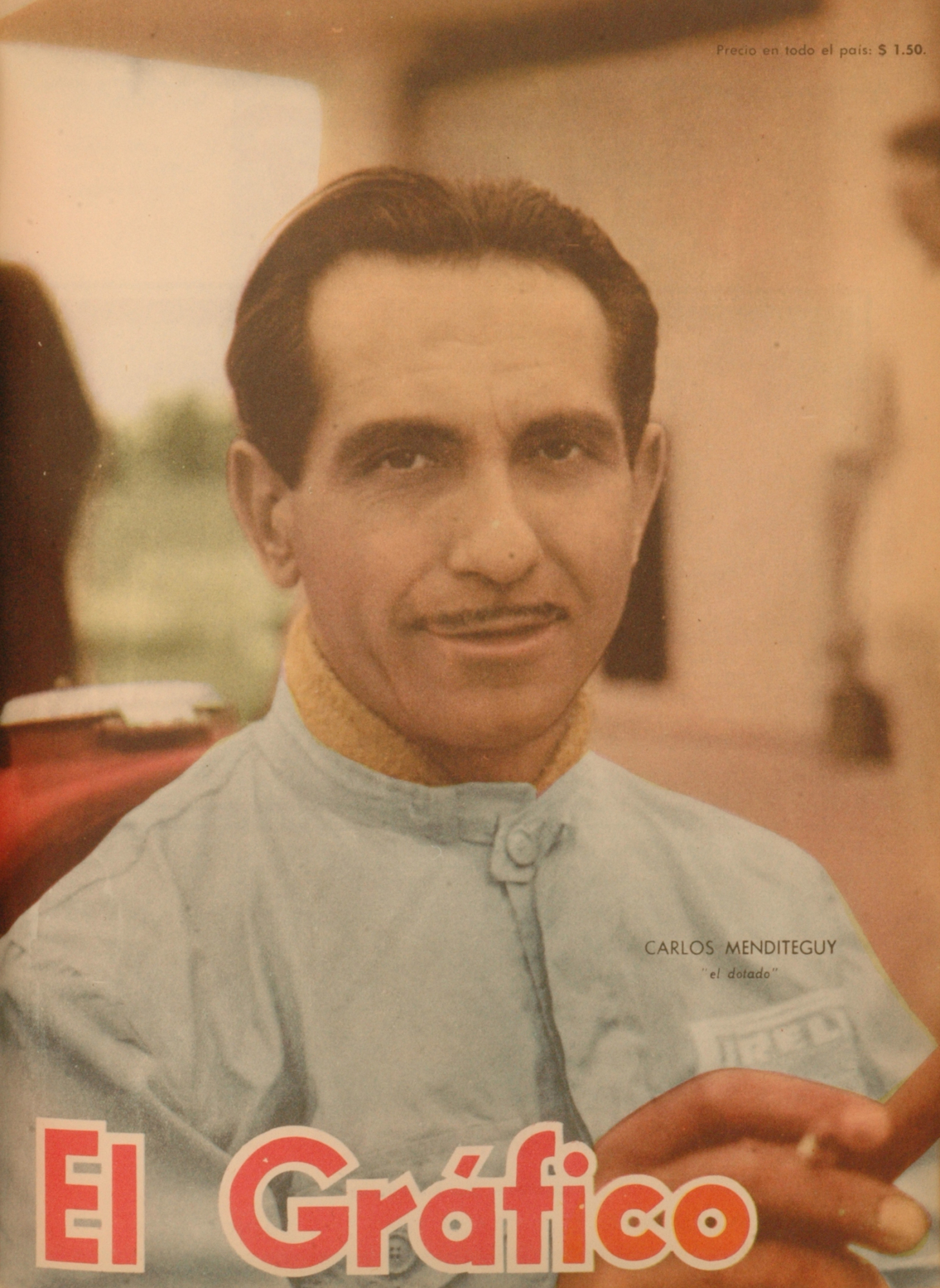 El Grafico del 12 de Marzo de 1954. Edicion 1805